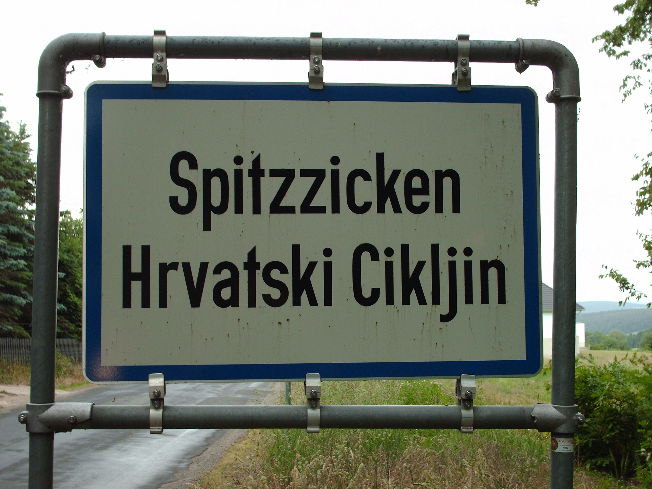 Spitzzicken (kro. Hrvatski Cikljin) zweisprachige Ortstafel Hornjoserbsce: Dwurěčna wjesna tafla we wsy Spitzzicken/Hrvatski Cikljin, Hrodowska, Awstriska